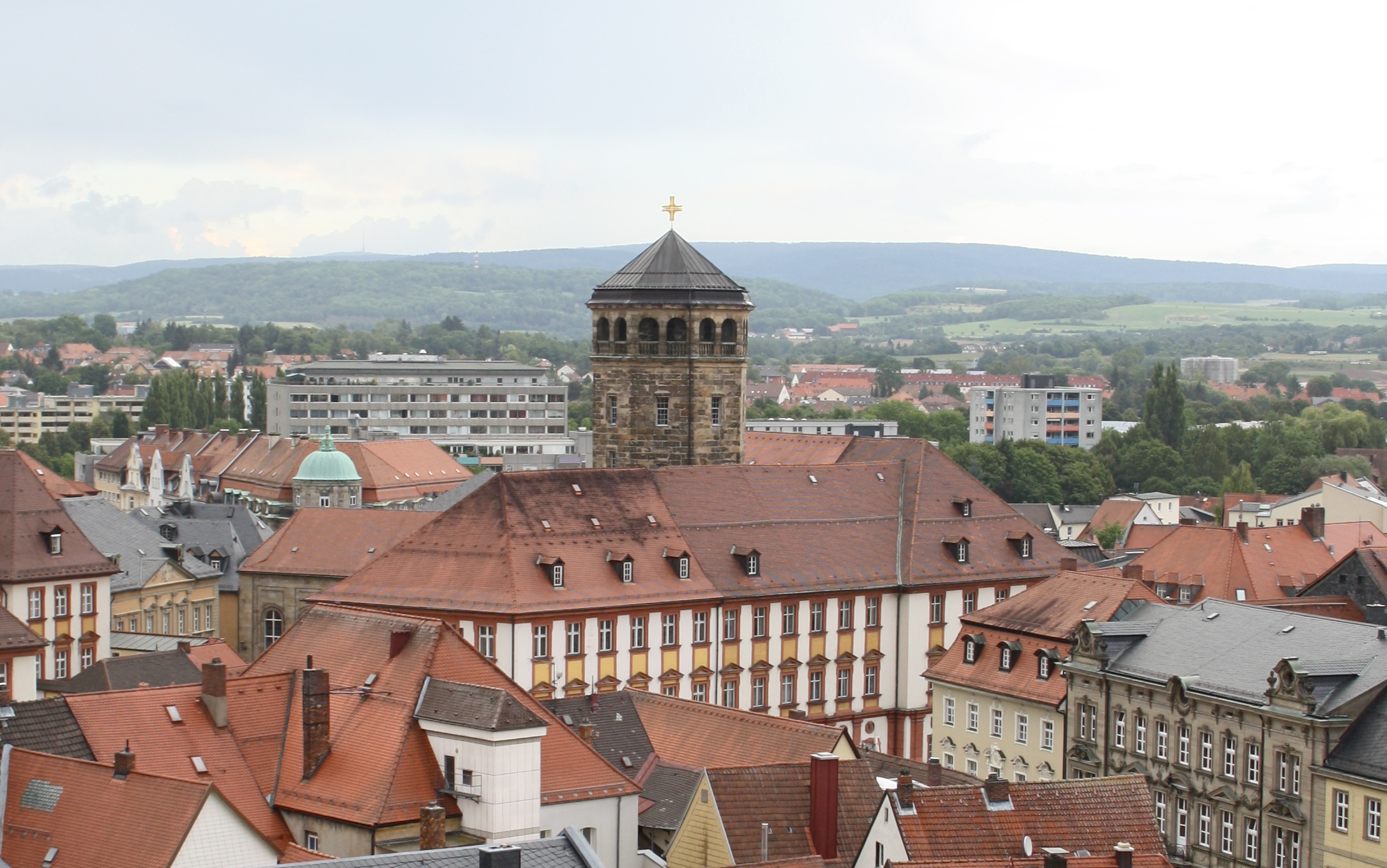 Altes Schloss mit Schlossturm Bayreuth